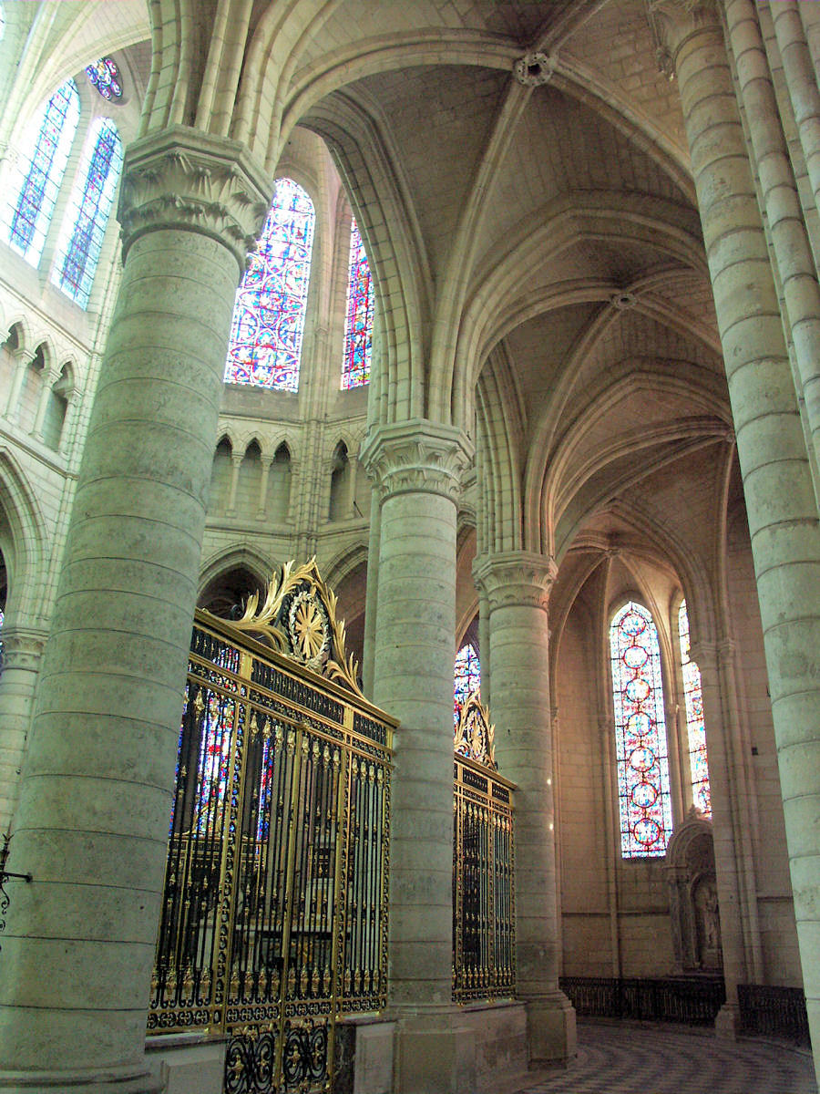 Cathédrale Saint-Gervais-et-Saint-Protais de Soissons, France